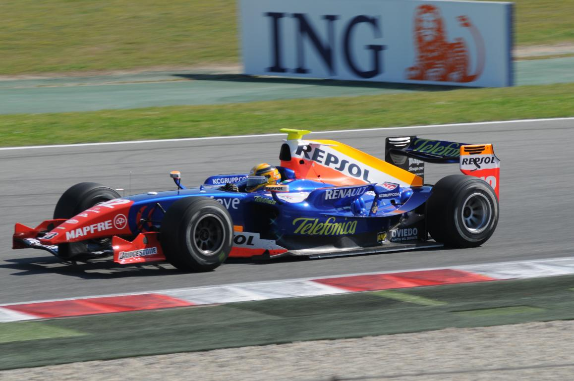 Giorgio Pantano während des 1. Laufs in Spanien 2008.